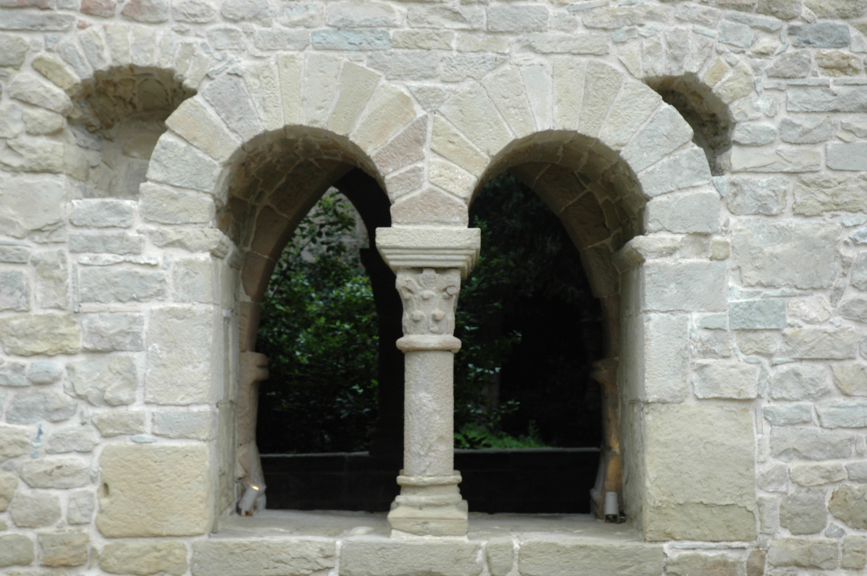 Sant Benet de Bages - Claustre - Sala capitular